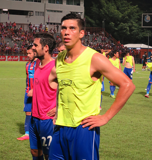 Elias Dolah